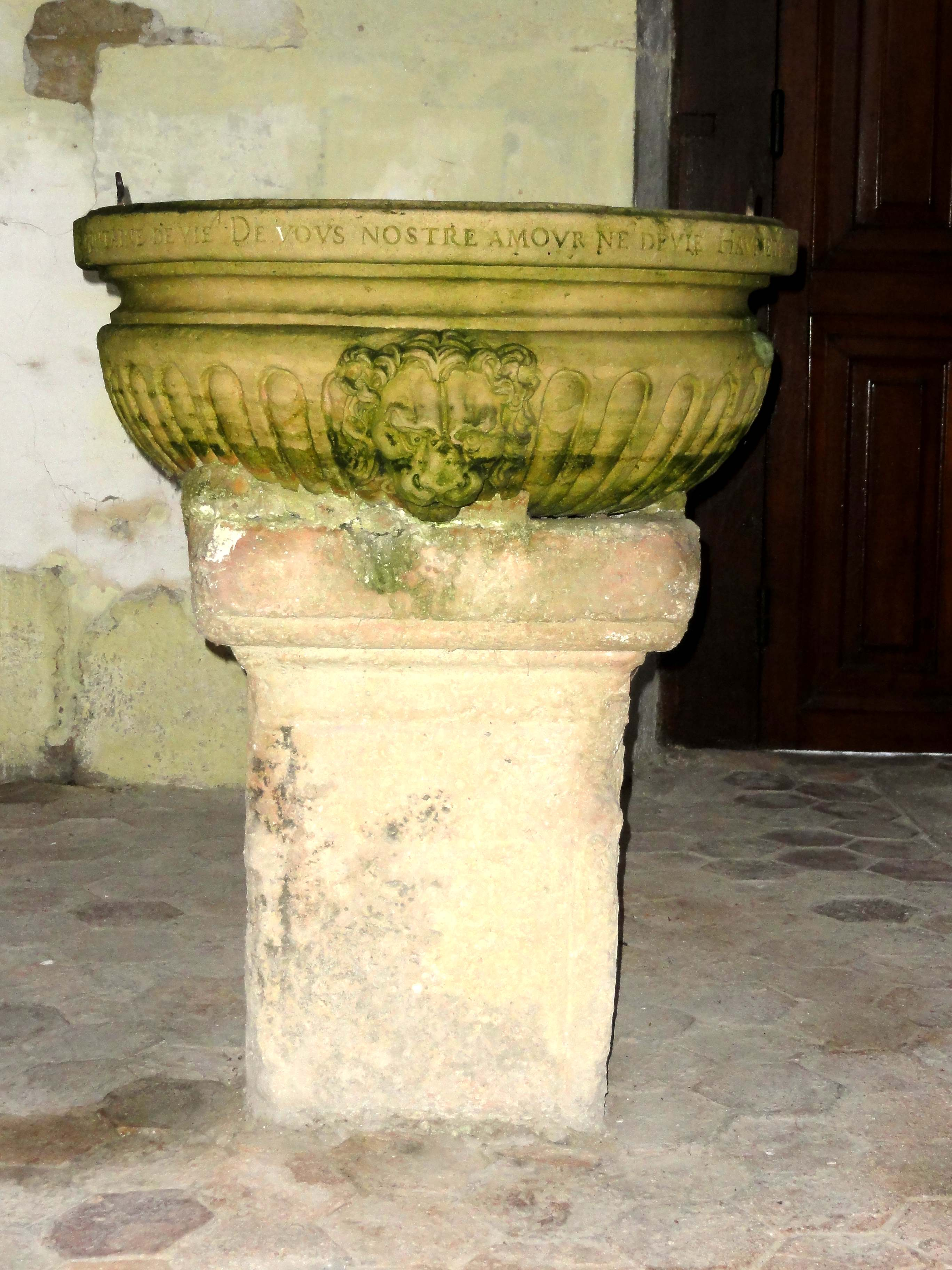 Fonts baptismaux de 1556.